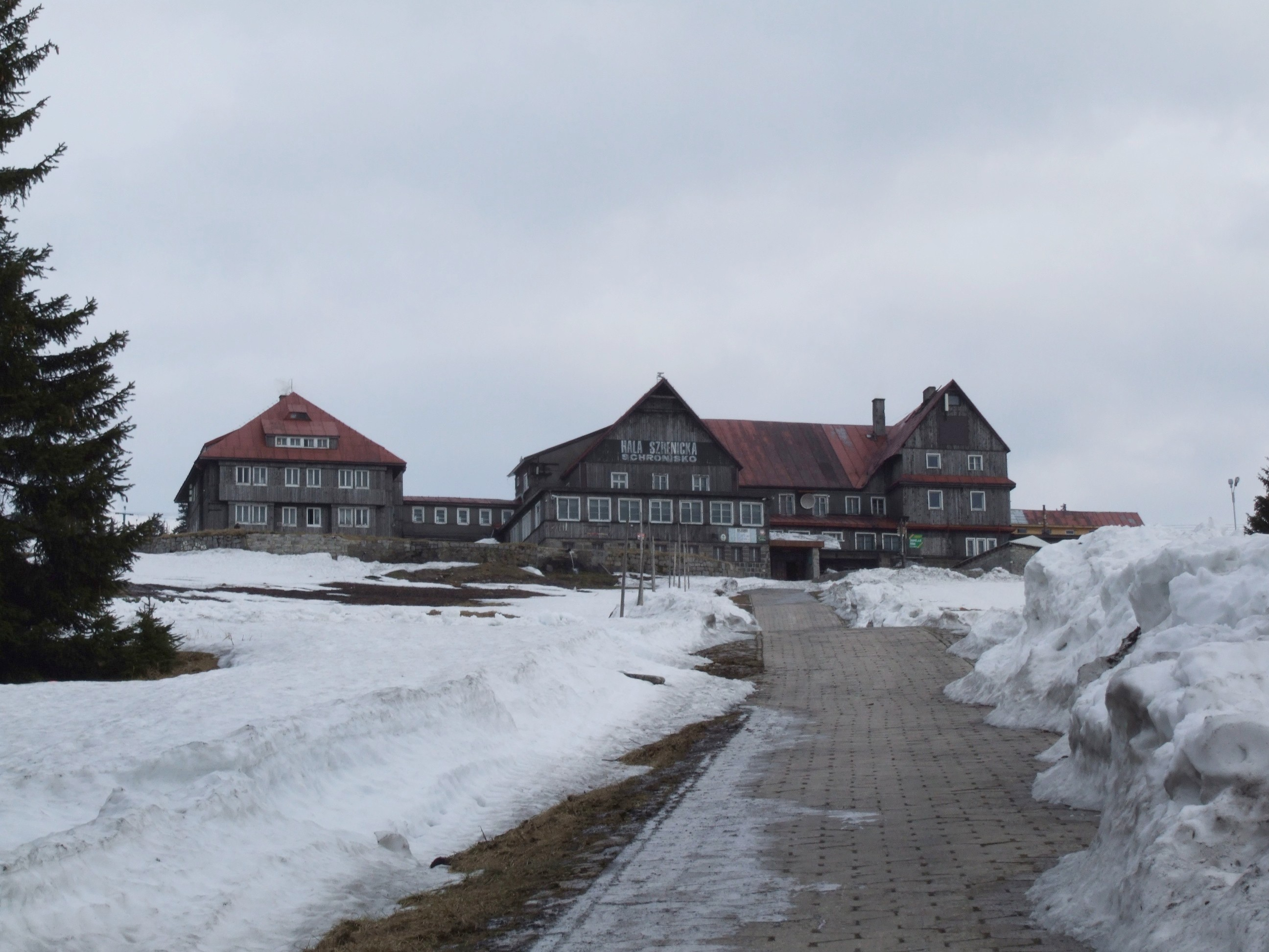 Schronisko na Hali Szrenickiej